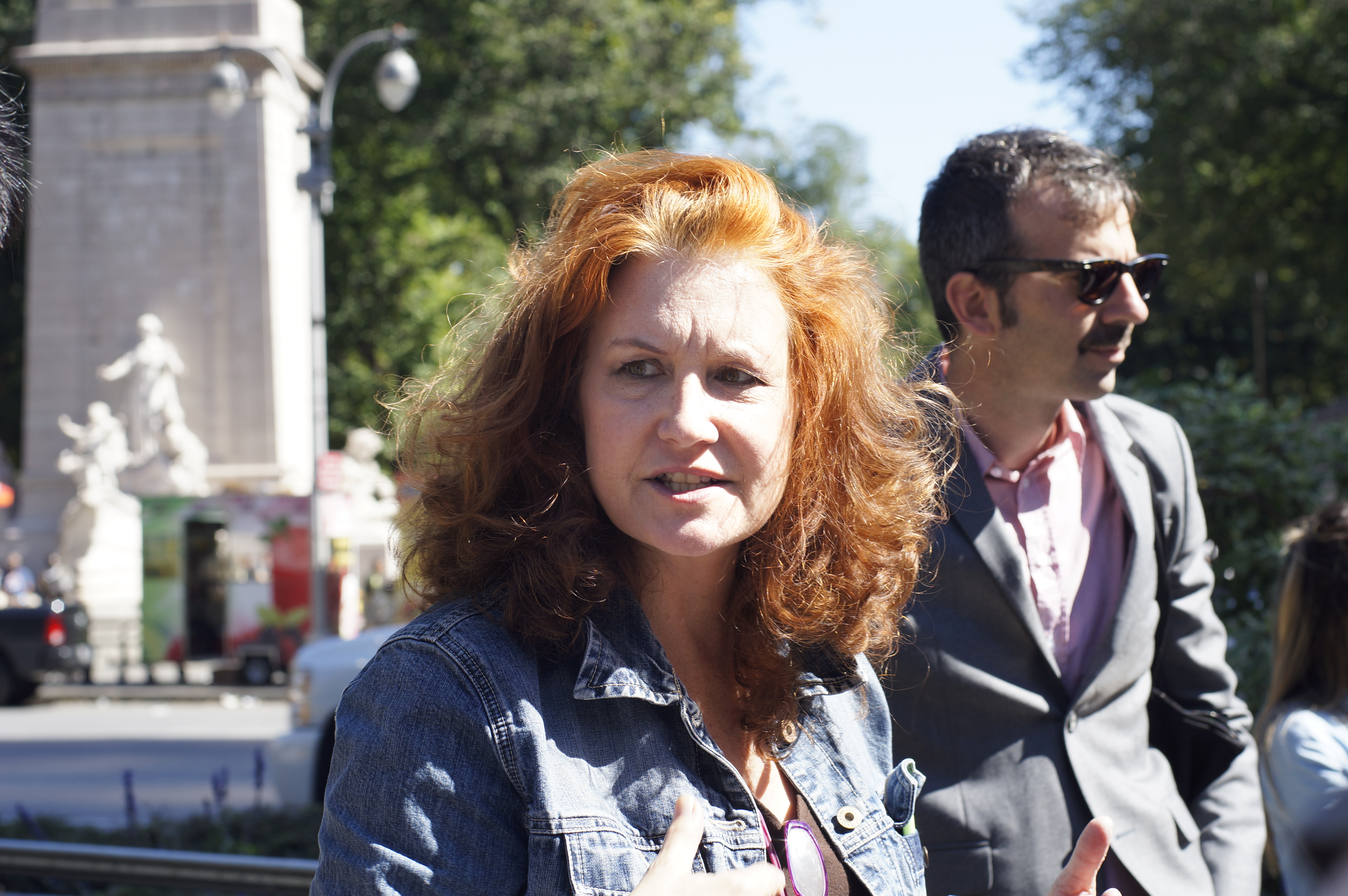 Mandala: Reimagining Columbus Circle Participatory walk lead by Karen Finley for Elastic City